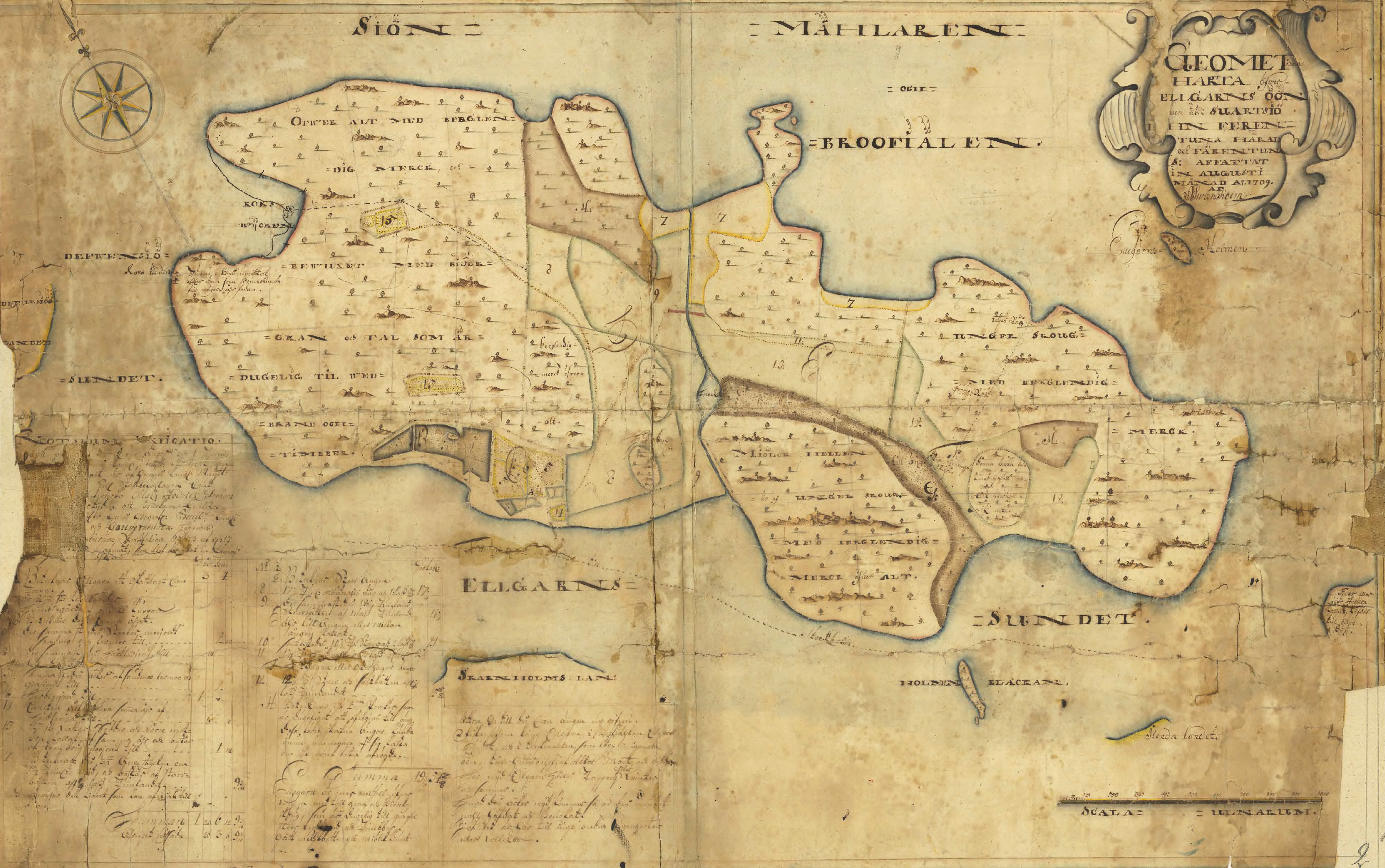 Karta över Eldgarnsö i Färentuna Härad